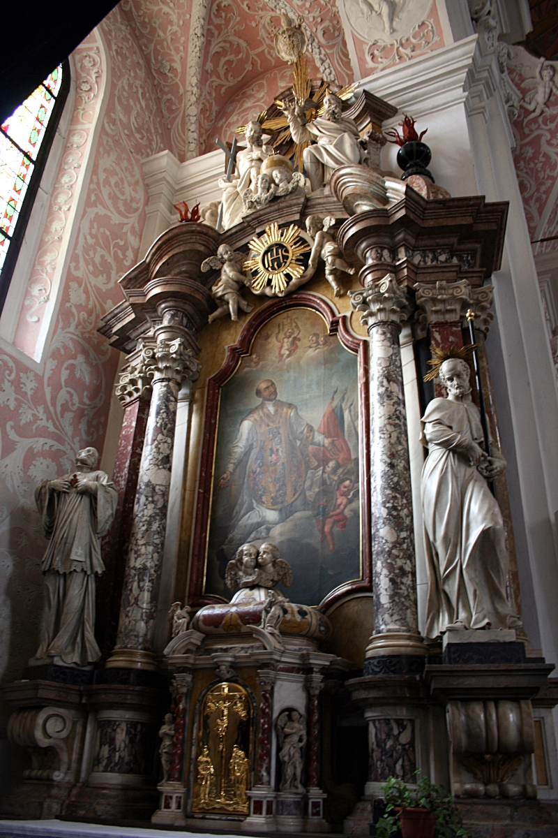 RKT Akademska crkva sv. Katarine. Mramorni oltar u kapeli svetog Ignacija Lojolskoga, remekdjelo je ljubljanskog kipara fr. Robbae iz 1730. godine. Oltarna slika svetog svetog Ignacija djelo je Slovenca Val. Metzingera (1699.-1759.). Lijevo je kip koji predstavlja slavnog pariškog profesora Franju Ksavera, kojega je Ingacije učinio isusovcem i apostolom Indije i Japana (1506.-1641.). Na vrhu oltara je grupa presvetog Trojstva, a ispod nje je svetogranište. Na zidu nasuprot oltara stuccoreljef prikazuje smrt sv. Ignacija.